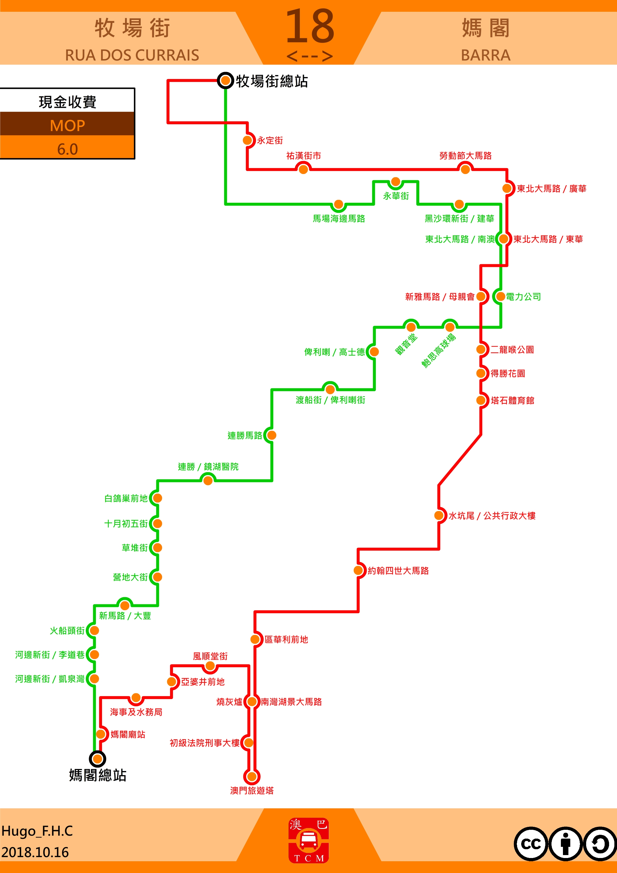 澳門巴士18走線圖